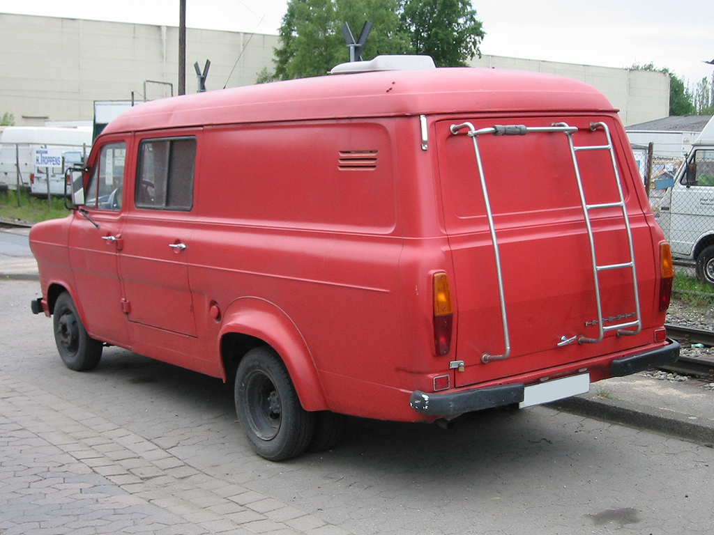 Ford Transit (1971-1977)